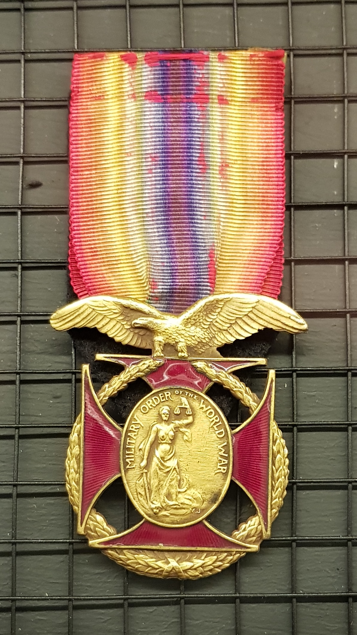 Amerykański Order Wojny Światowej przyznany gen. J. Hallerowi, ze zbiorów w kolekcji Muzeum Wojska Polskiego w Warszawie